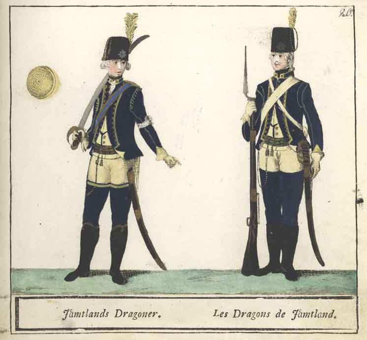 Jämtlands dragoners uniform m/1779, ur C. G. Roos samling.